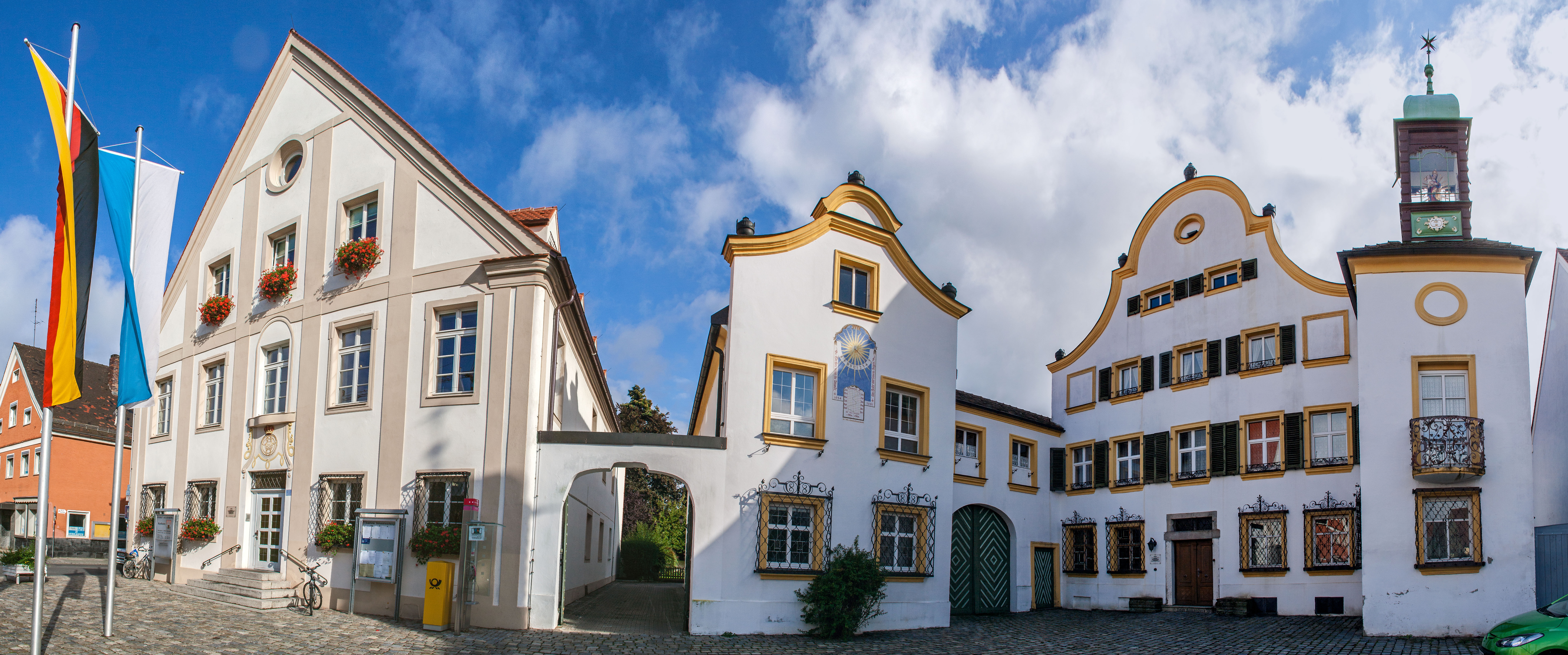 Bürgerhaus, sog. HeckelhausThis is a photograph of an architectural monument.